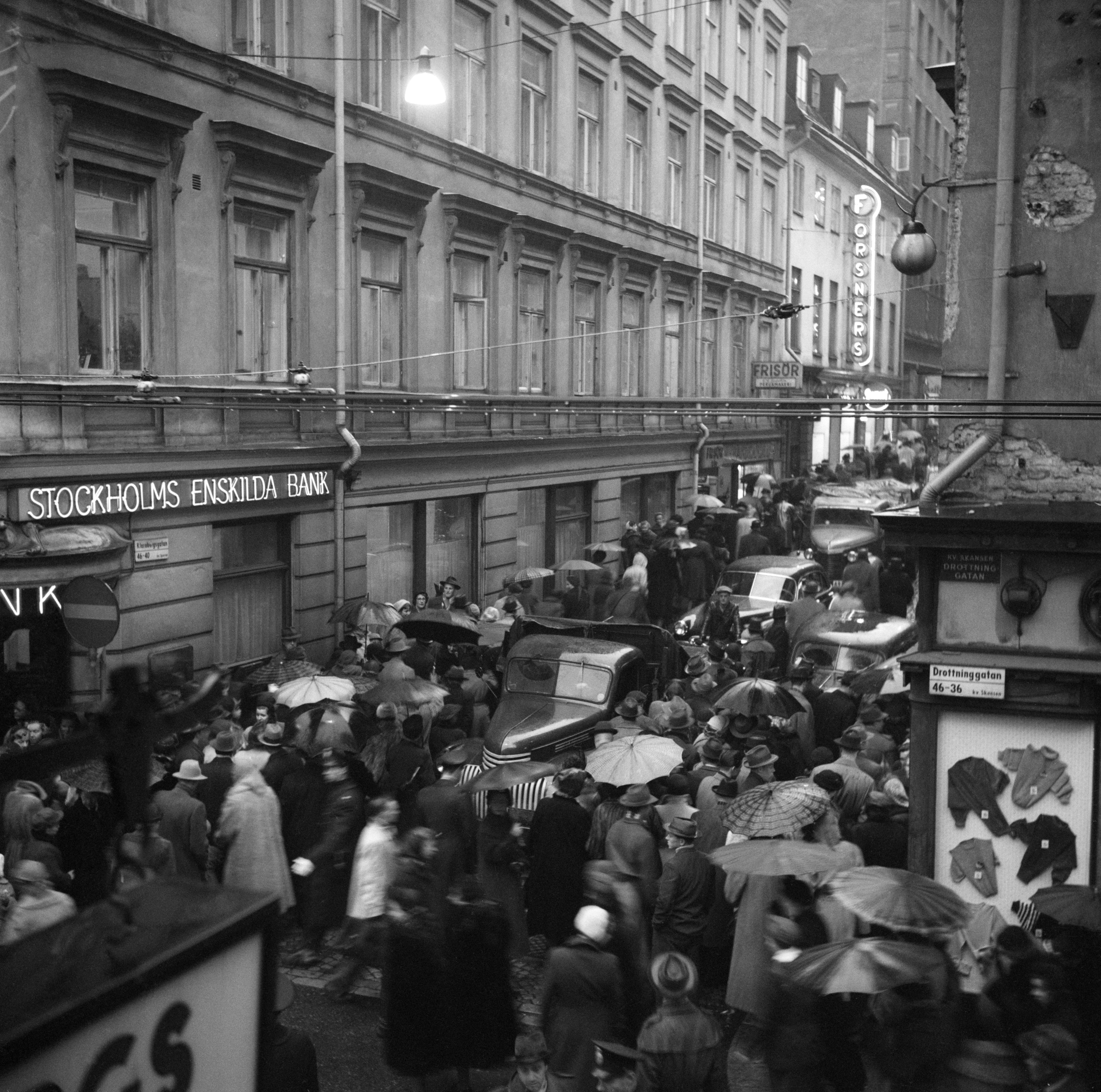 Hörnet Drottninggatan - Klarabergsgatan: Klarabergsgatan österut mellan kvarteret Sporren (till vänster) och kvarteret Skansen. Byggnaderna revs 1955 i samband med Norrmalmsregleringen.